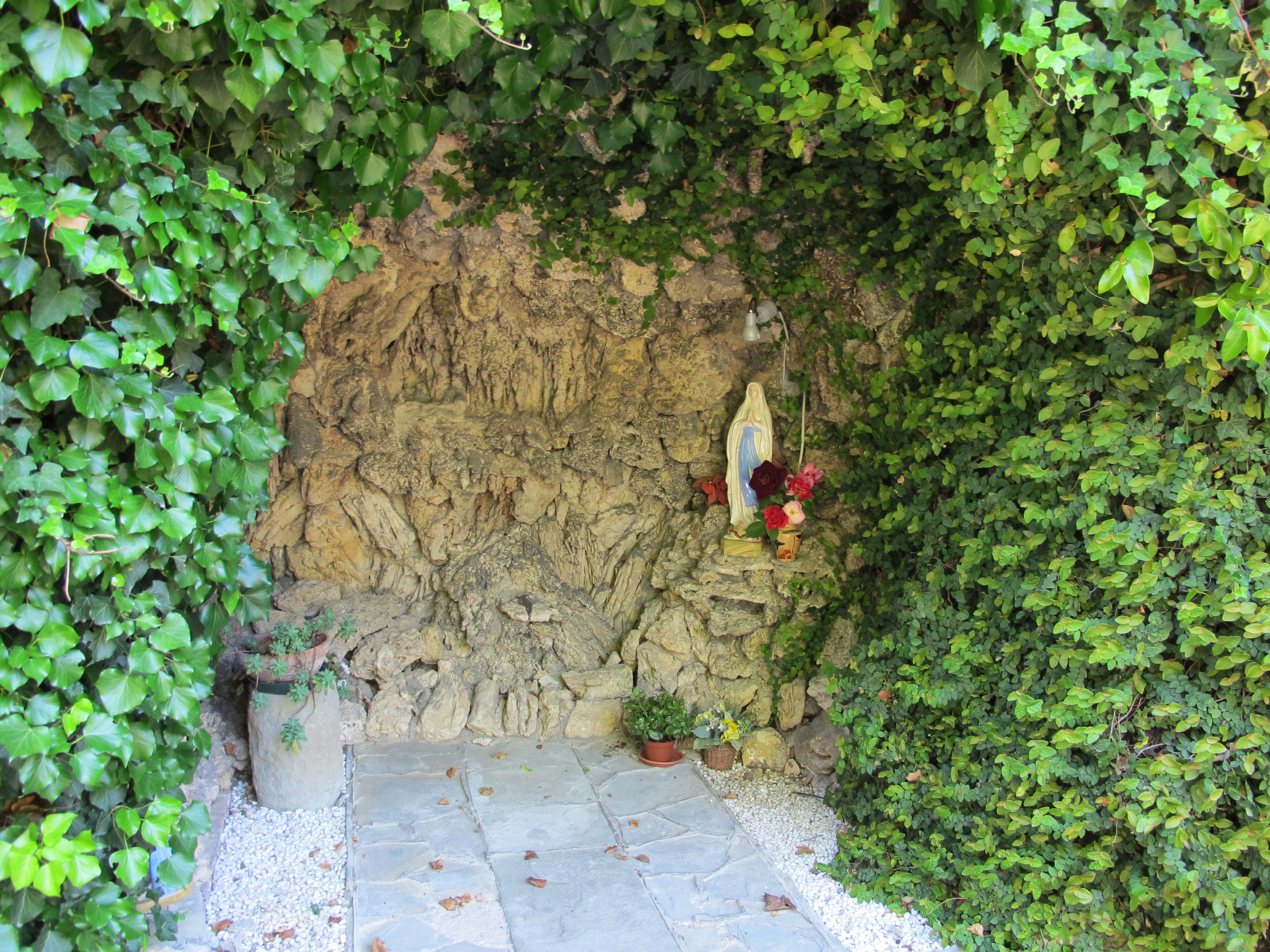 Palazzo guidi raggio, giardino 11 grotticina